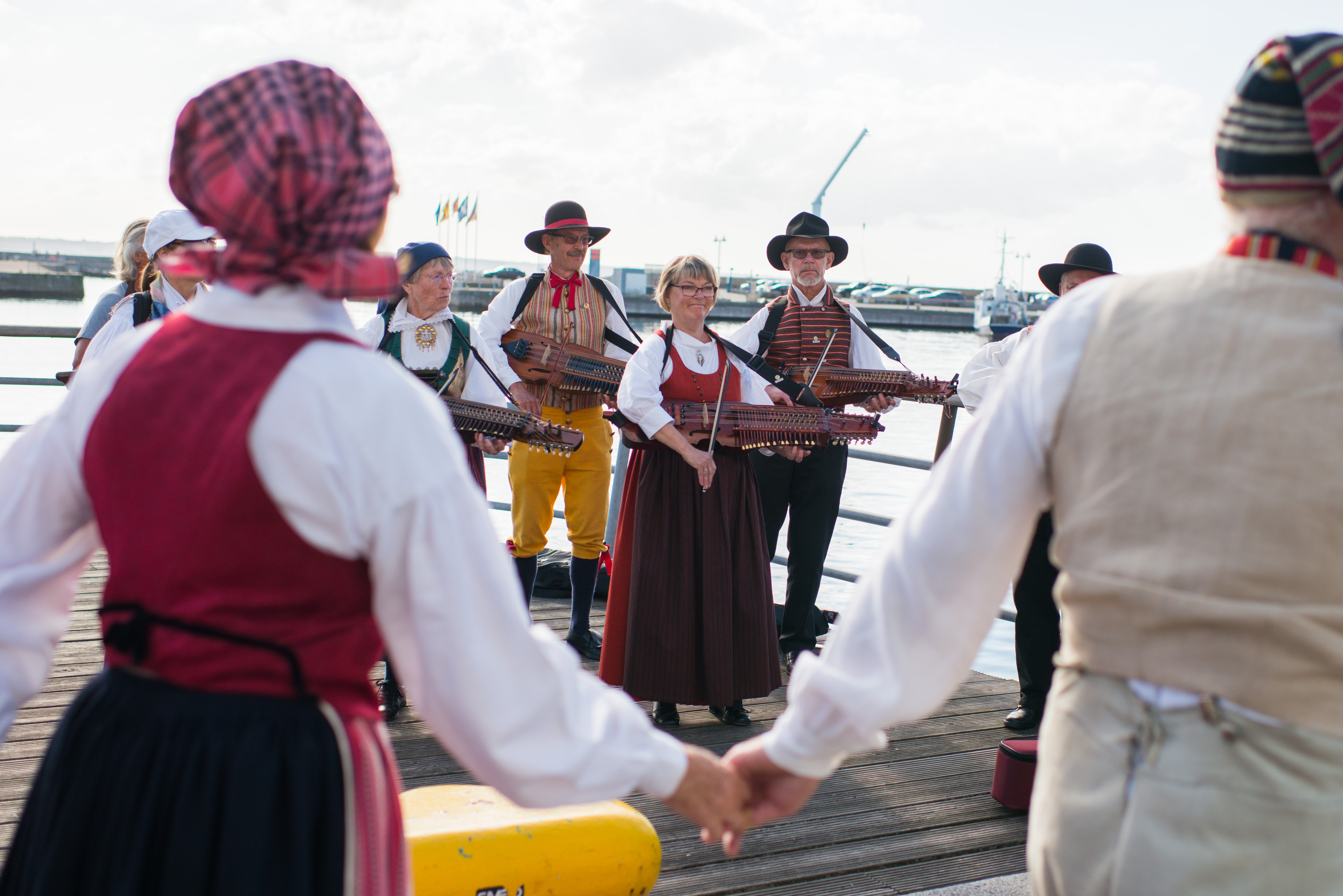 Eurpoeade i Helsingborg